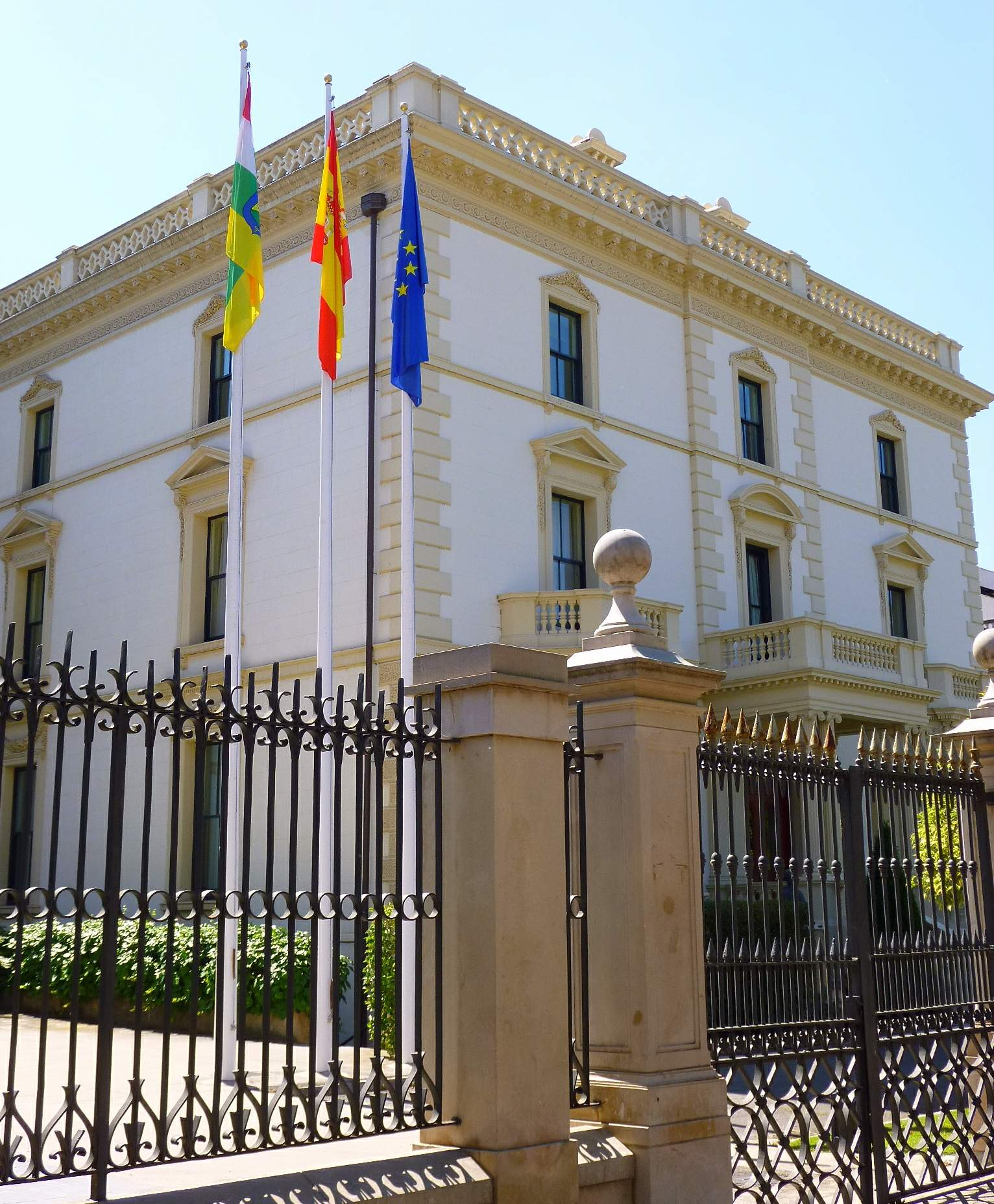 Palacio de la Presidencia del Gobierno de La Rioja (Logroño)